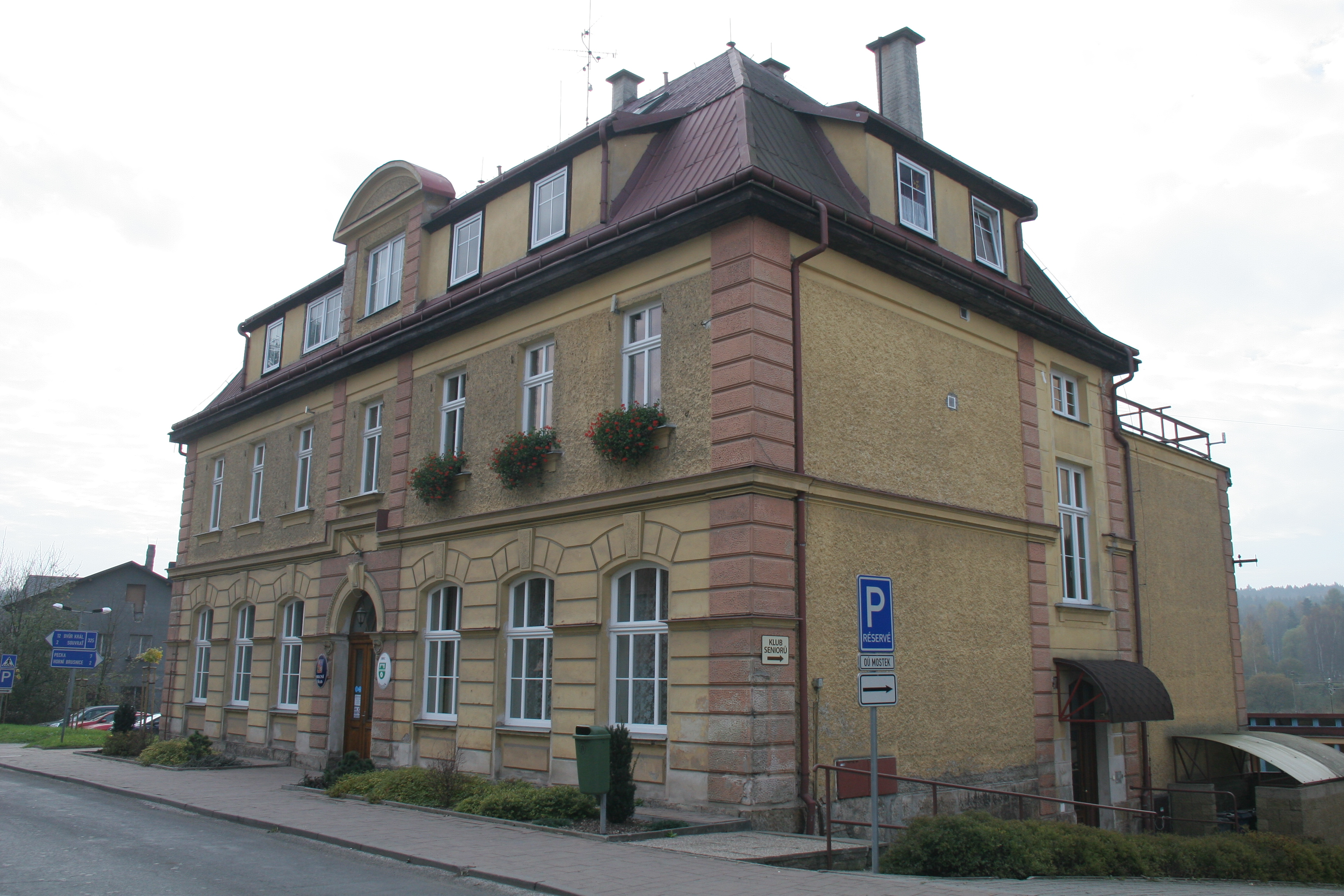 Mostek obecní úřad